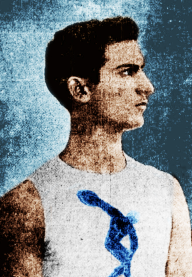 Ο Κωστής Τσικλητήρας